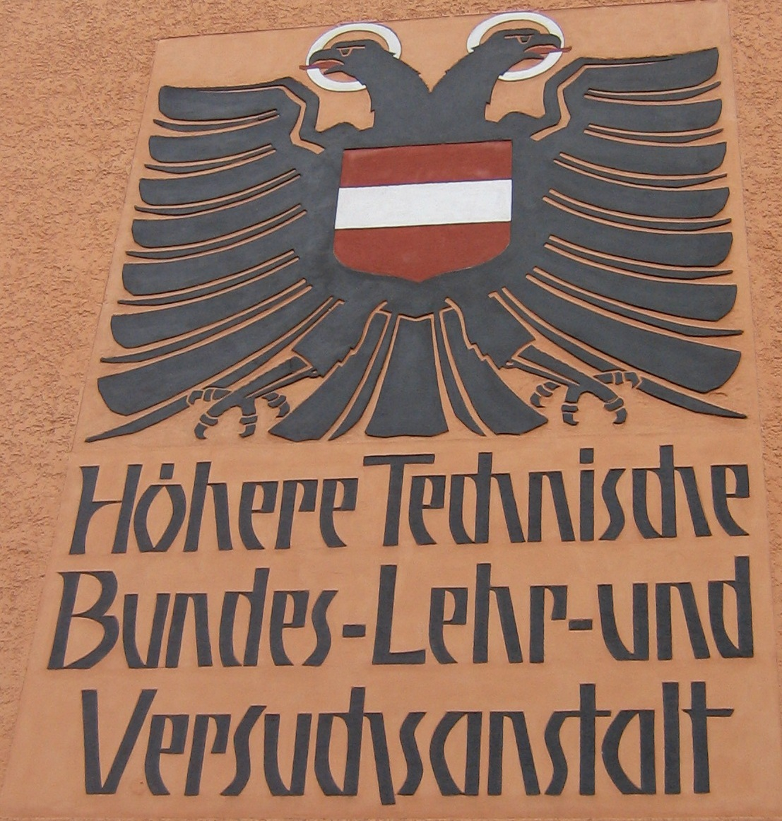 Das Wappen der HTL Bregenz am Hauptgebäude in der Reichsstraße 4